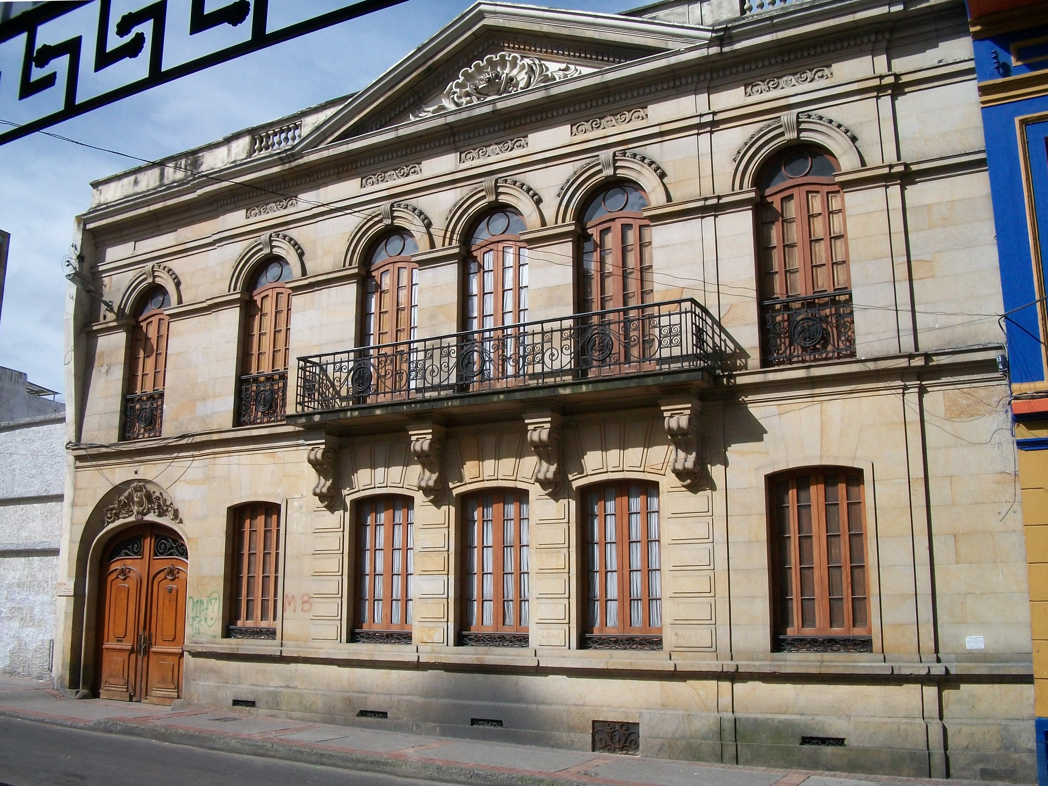 Casa Leo Kopp Castello, clle 18 cra 5. Bogotá, barrio Veracruz.